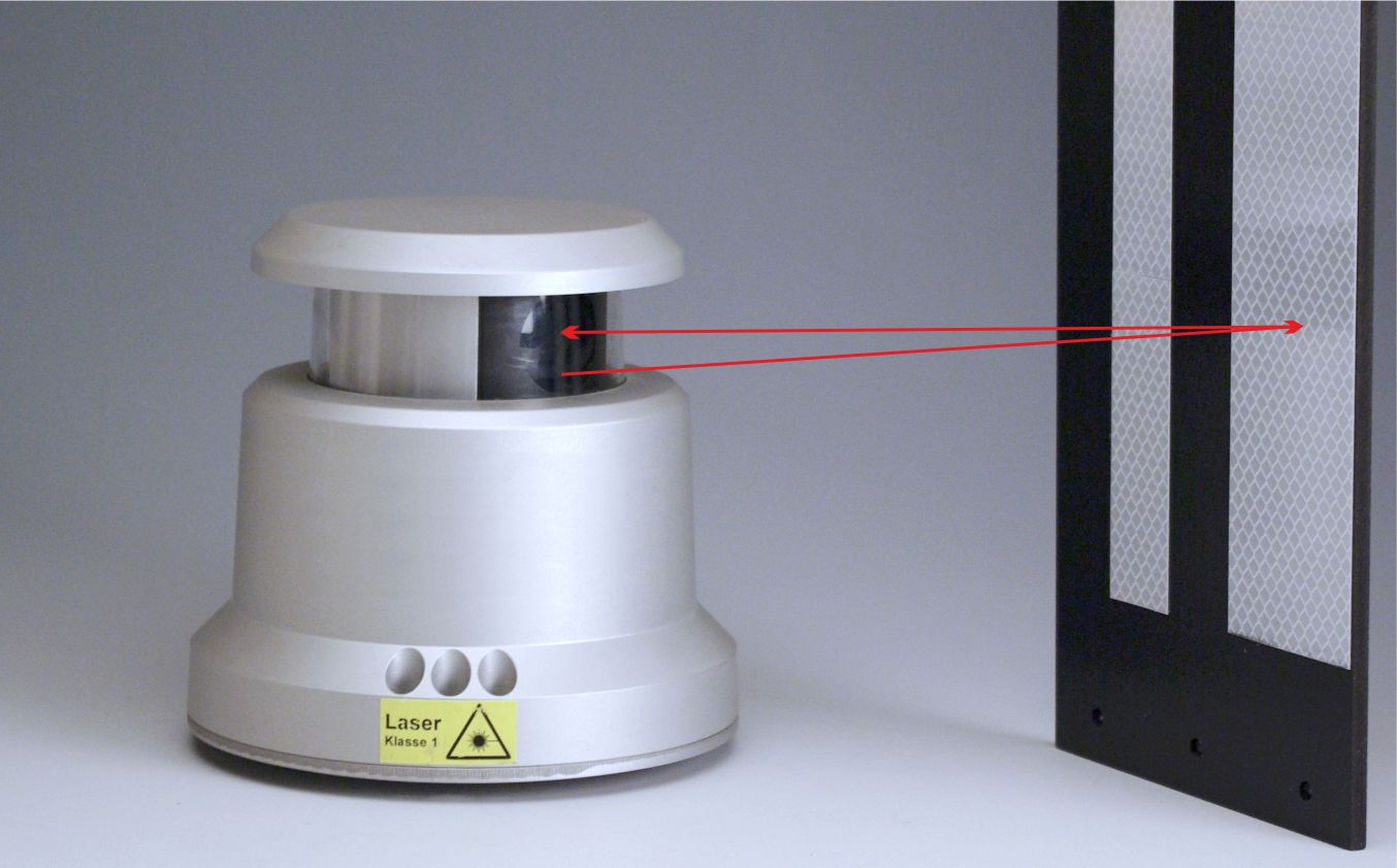 Komponenten für Lasernavigation: Laserscanner, 360° Scanbereich, 0,01° Winkelauflösung, 27 m Reichweite; Reflektormarke mit retroreflektierendem Material, zwei unterschiedlich breite Streifen mit dazwischenliegender Lücke bilden eine Art Mini-Barcode